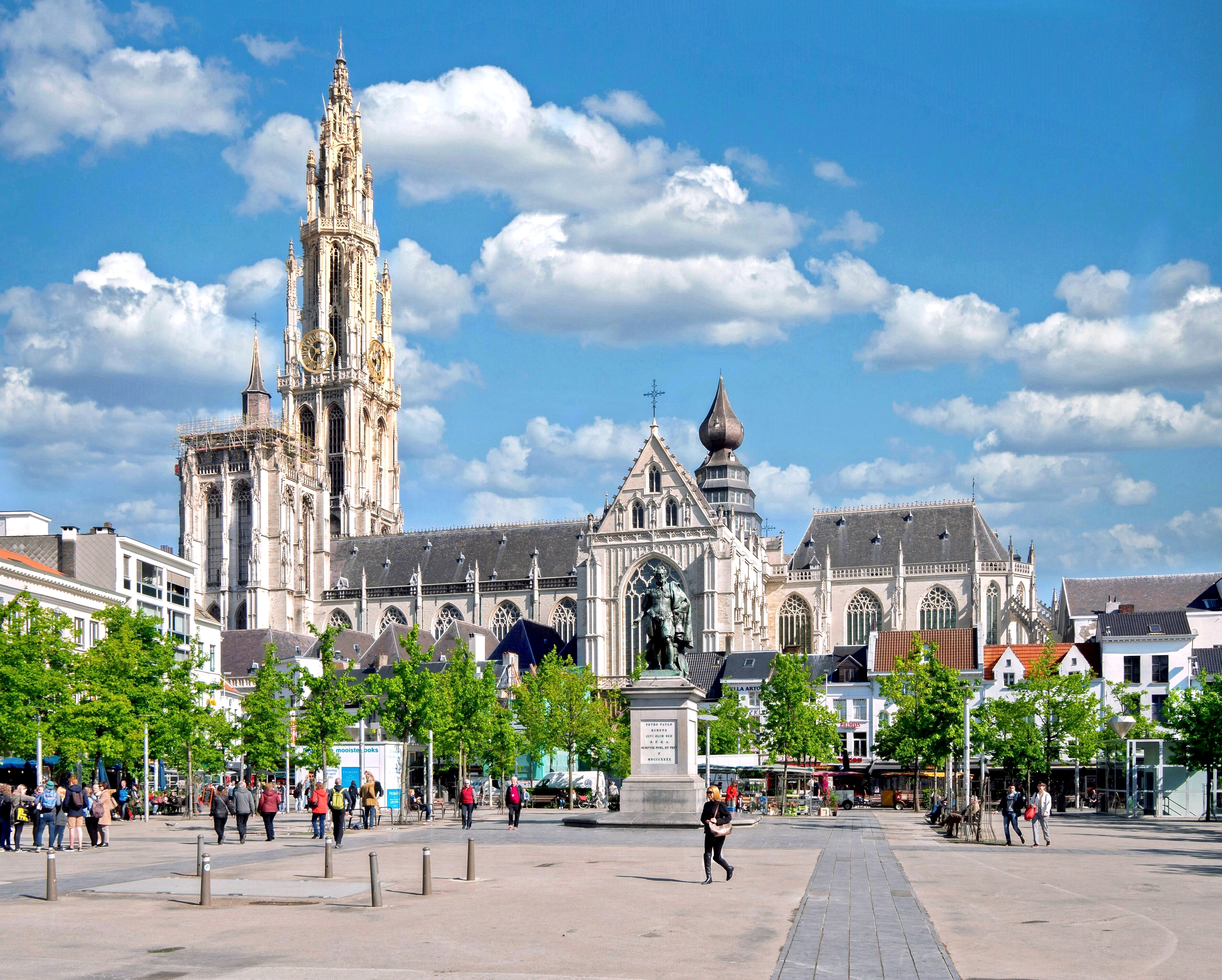 Mit 117m Länge, 40m hohem Langhaus und dem 123m hohem Turm, dessen Spitze aus Doornijker Kalkstein um 1500 vollendet wurde, ist die Kathedrale von Antwerpen die größte Kirche Belgiens